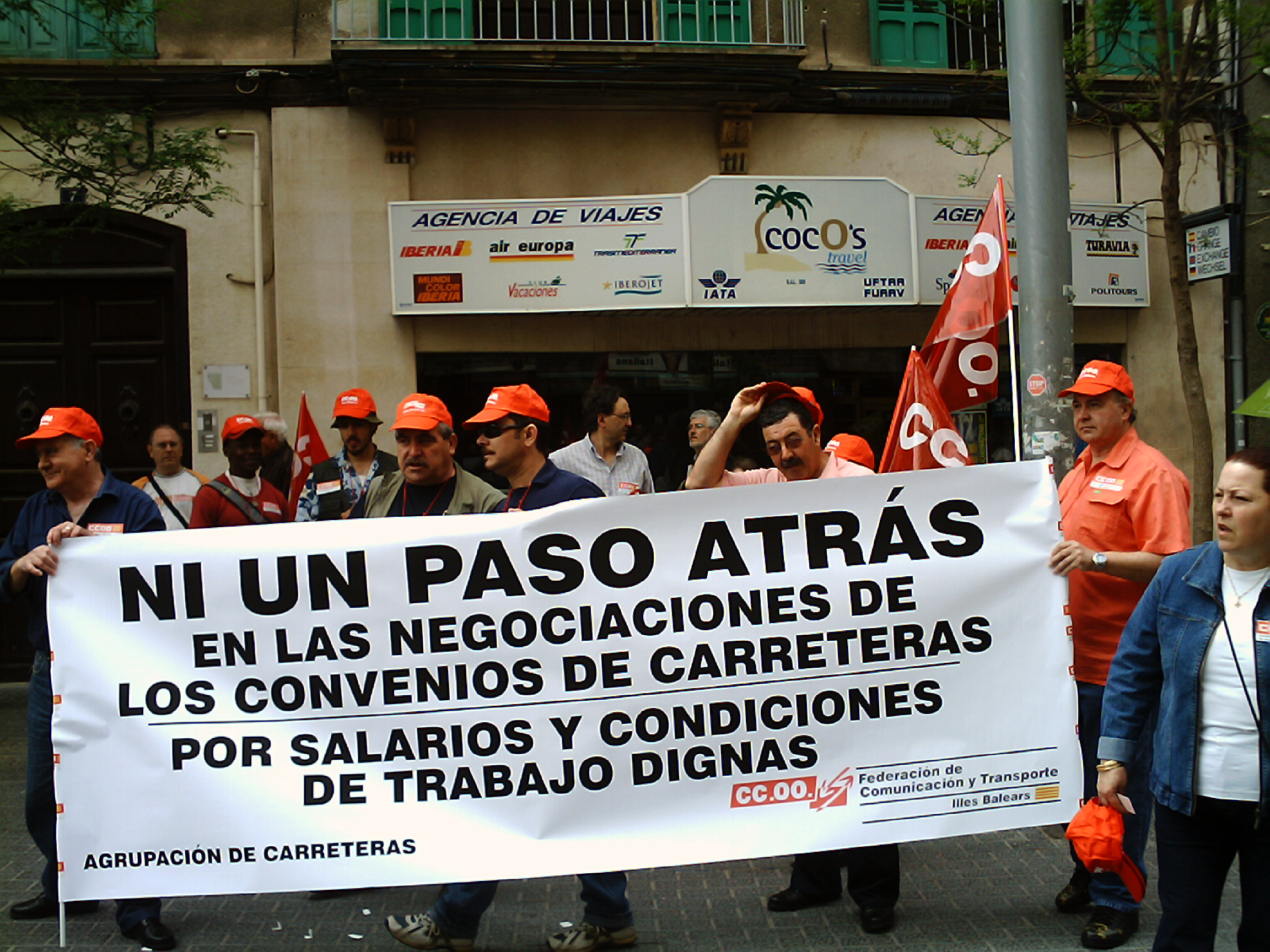 Manifestació del 1er de maig de 2007, Palma (Mallorca).